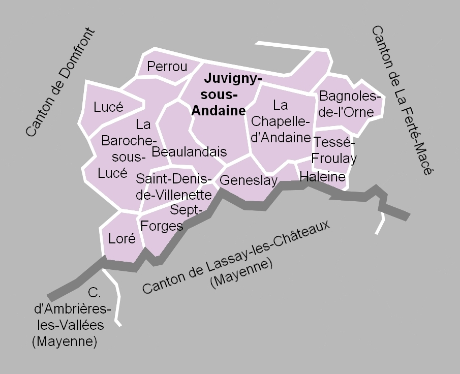 Carte du canton de Juvigny-sous-Andaines en 2012.